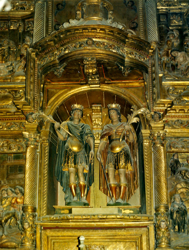 Abadia de Santa Maria d'Arles. Retaule d'Abdó i Senén. Vallespir, França